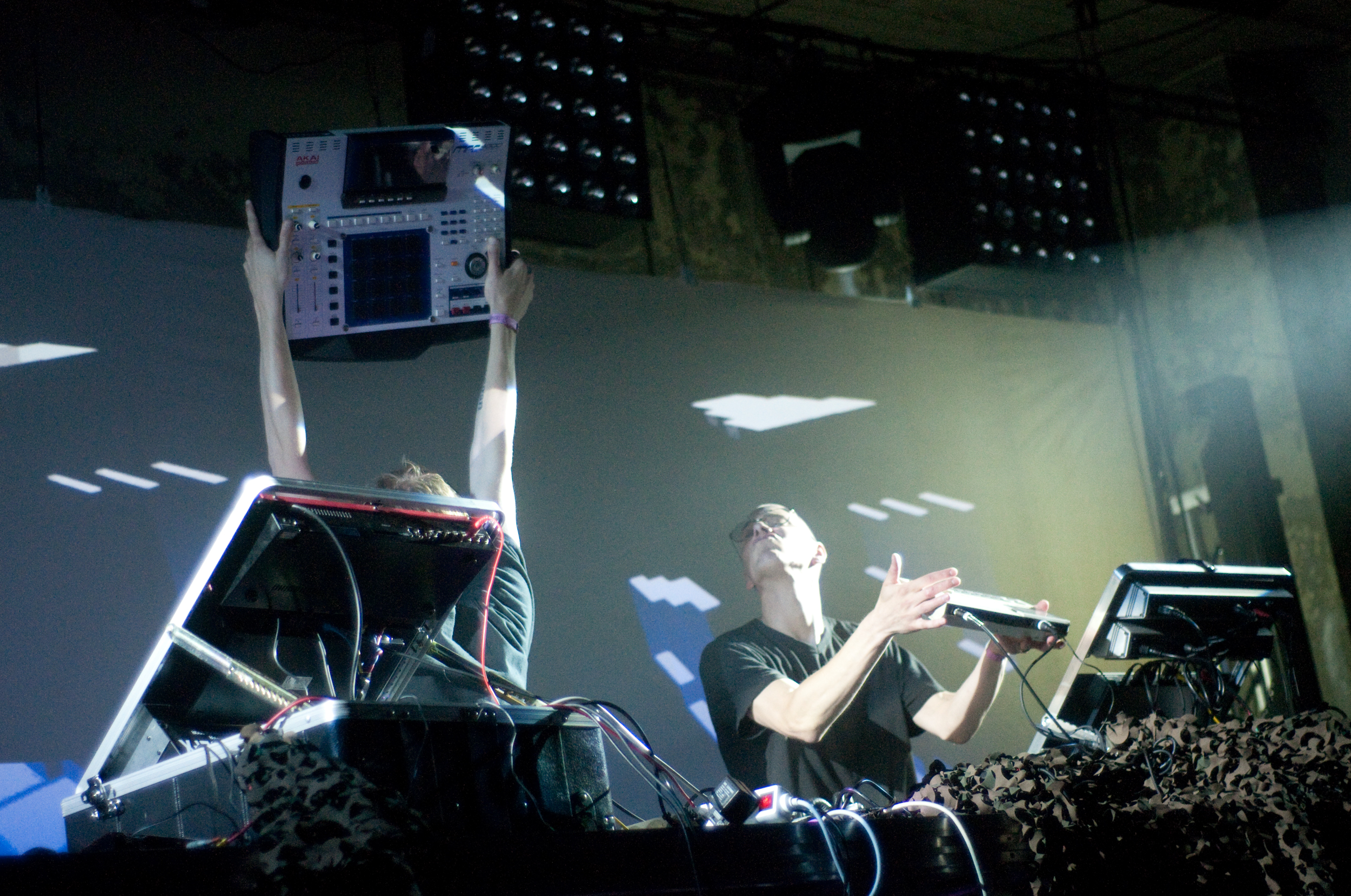 Akai MPC4000, Norbergfestival 2009